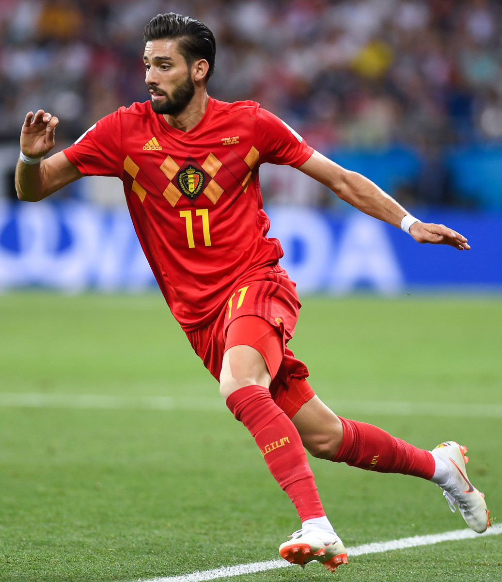 Потрясающий камбэк сборной Бельгии в матче с Японией